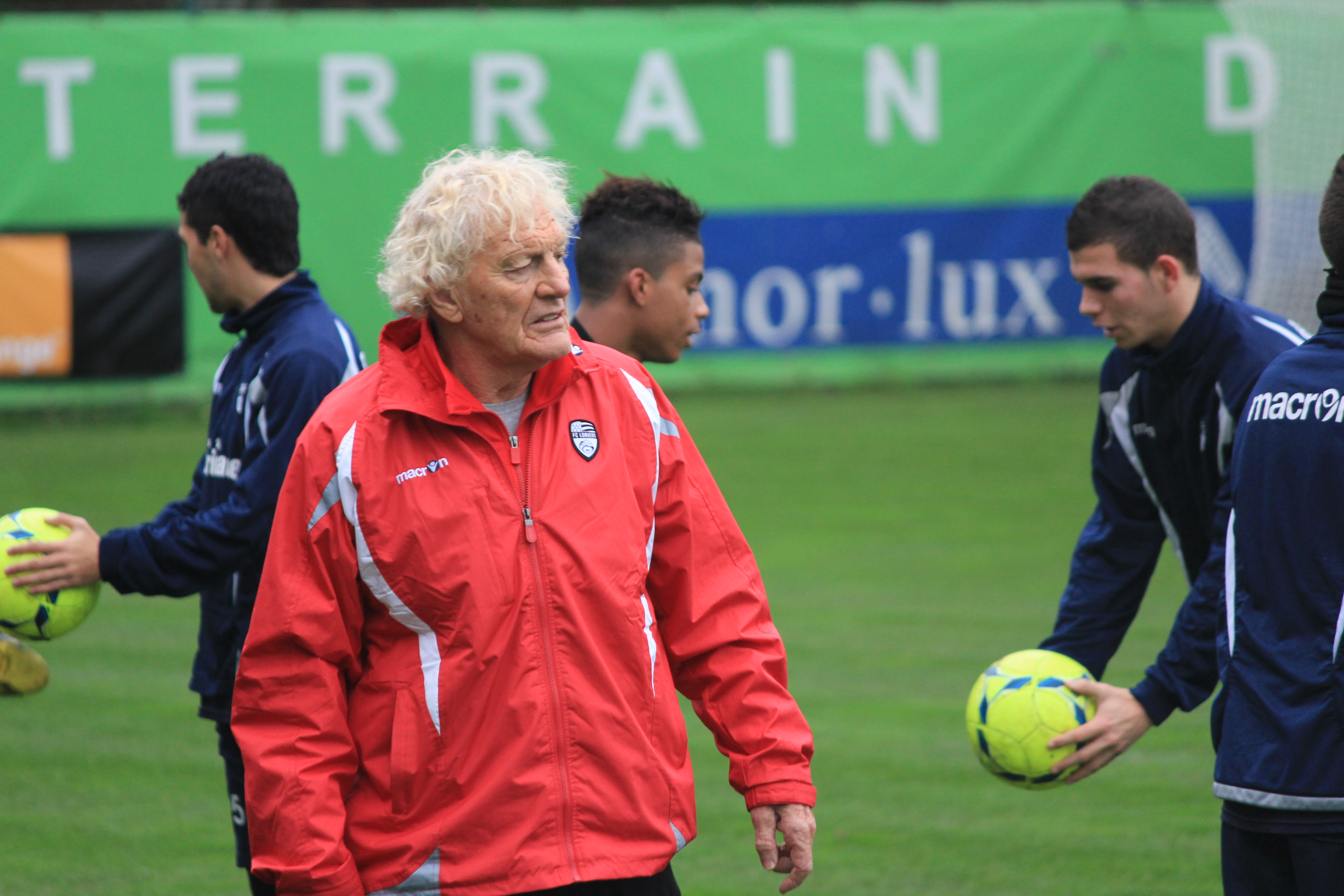 Tiburce darou pendant un entrainement du FC Lorient le 3 janvier 2012